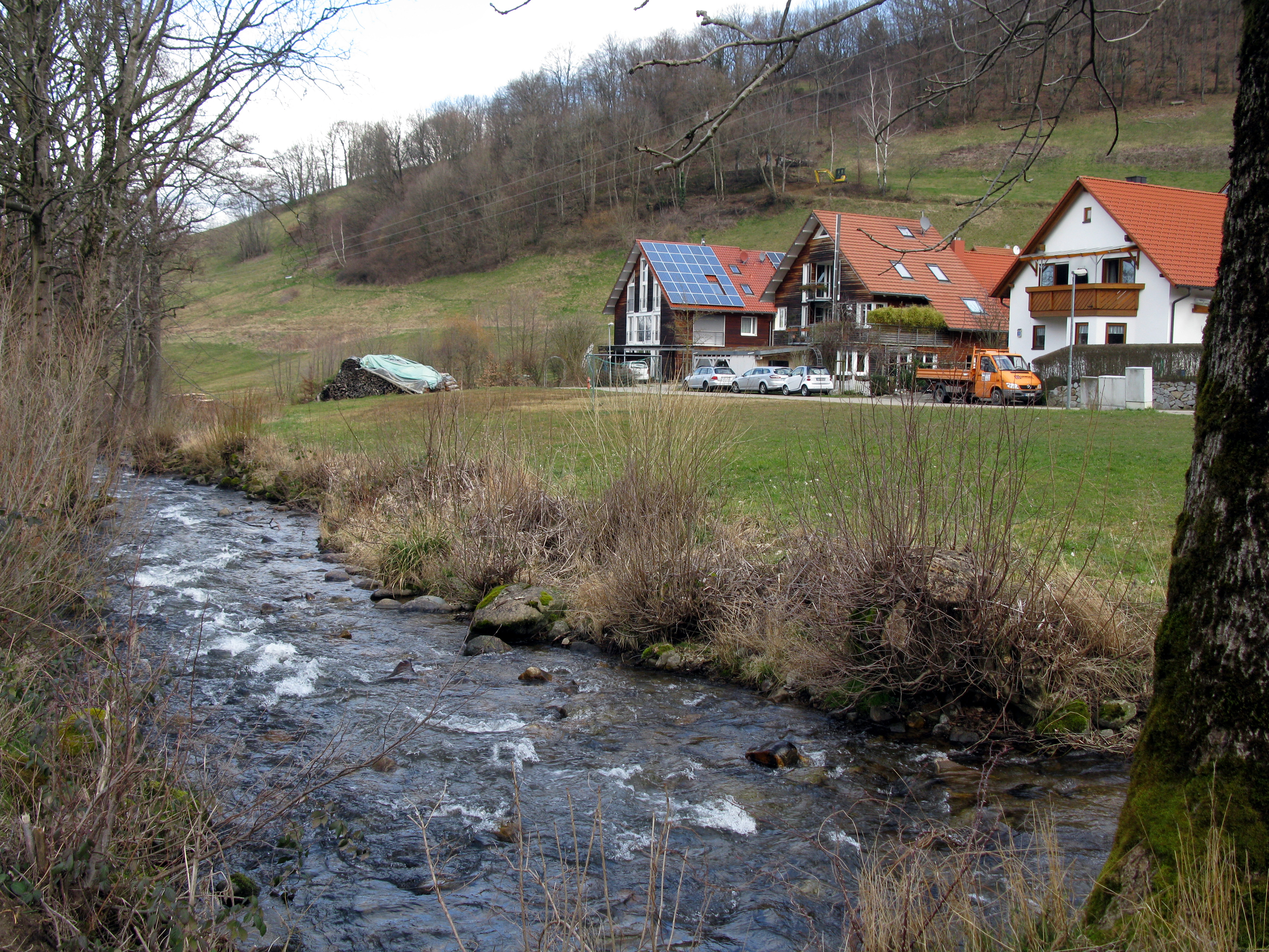 Osterbach in Oberried-Zastler, Siedlung am Eckweg